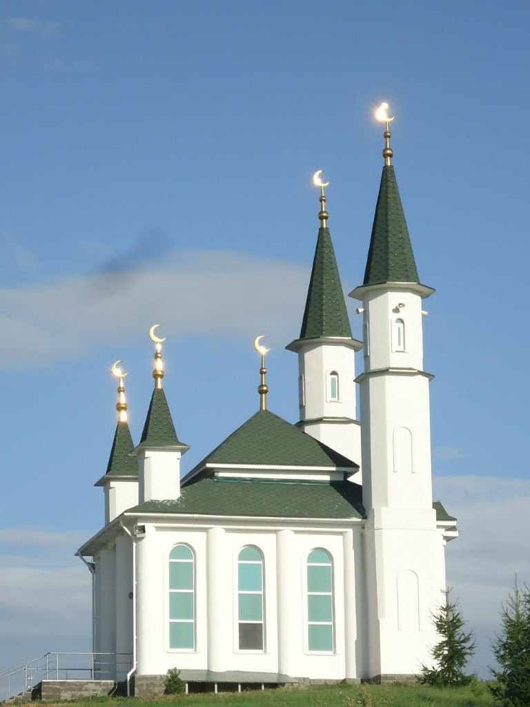 Башҡортса: Нарыҫтау тауы янындағы мәсет. Миәкә районы, Башҡортостан республикаһы